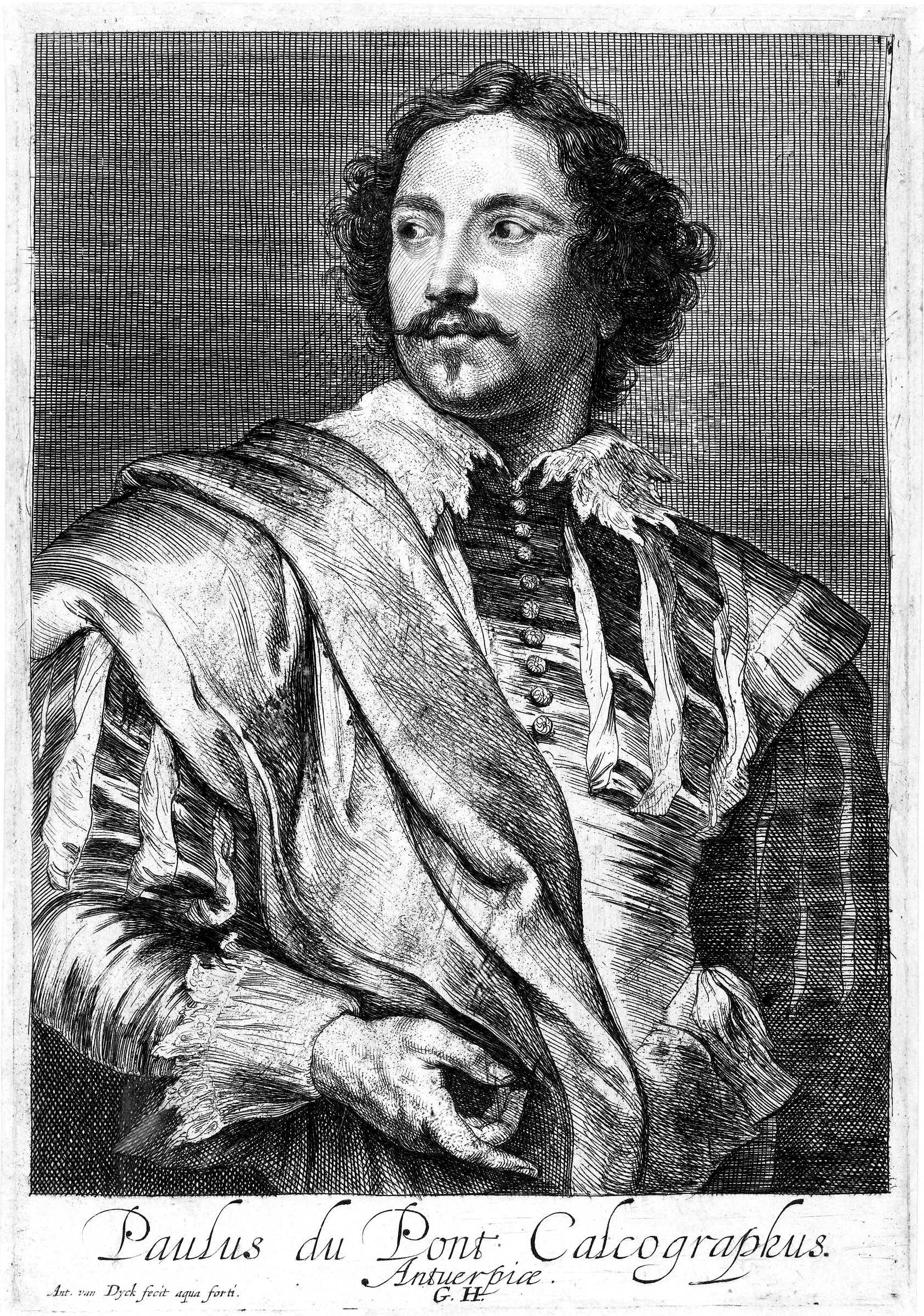 Paulus Pontius (1603-1658)